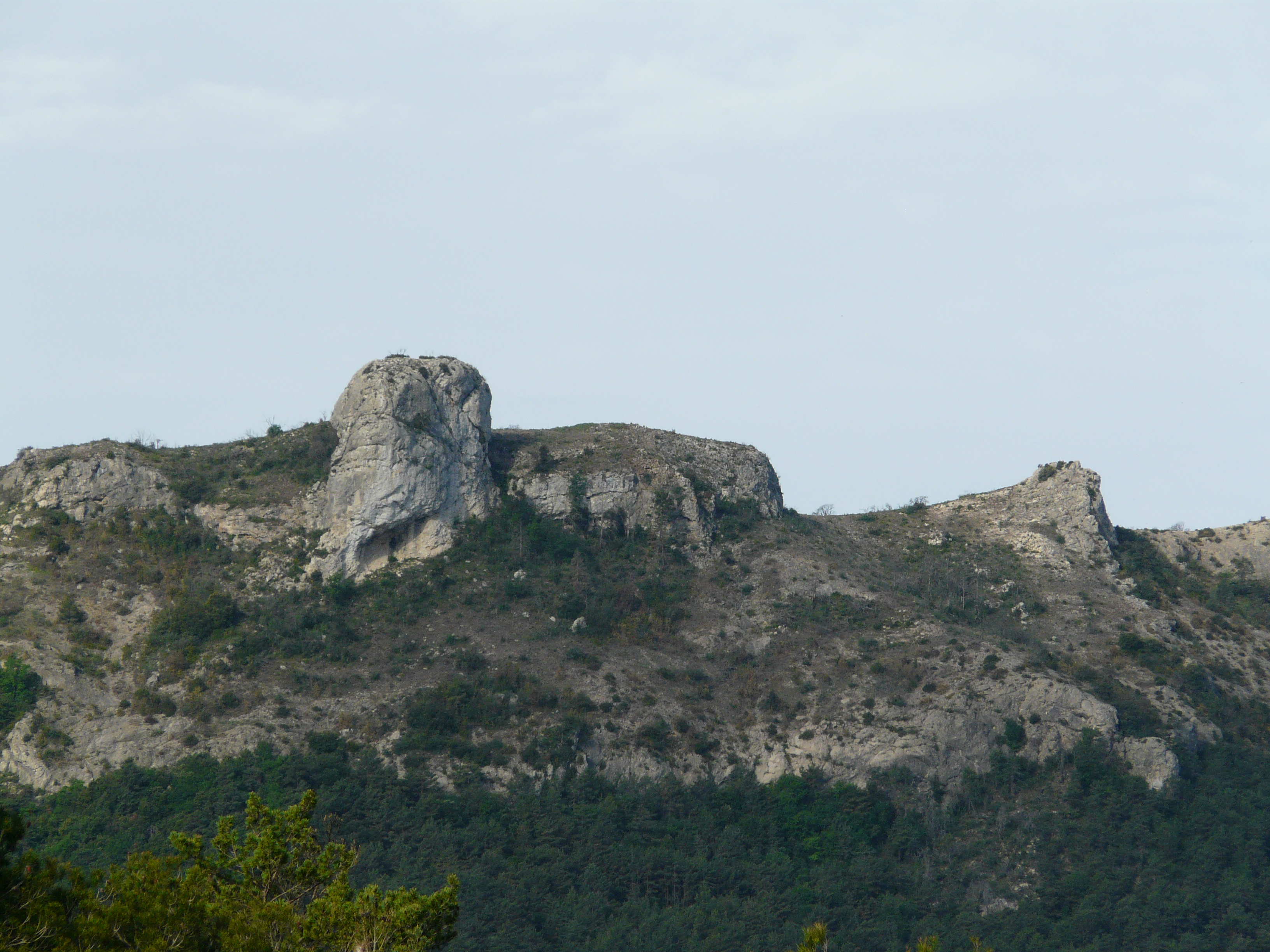 Muntanyes de Prades (Baix Camp, Conca de Barberà, Alt Camp, Priorat, Garrigues) (Montblanc, Vimbodí, Mont-ral i altres). This is a a photo of a natural area in Catalonia, Spain, with id: ES510143 Object location41° 18′ 36″ N, 1° 01′ 48″ E